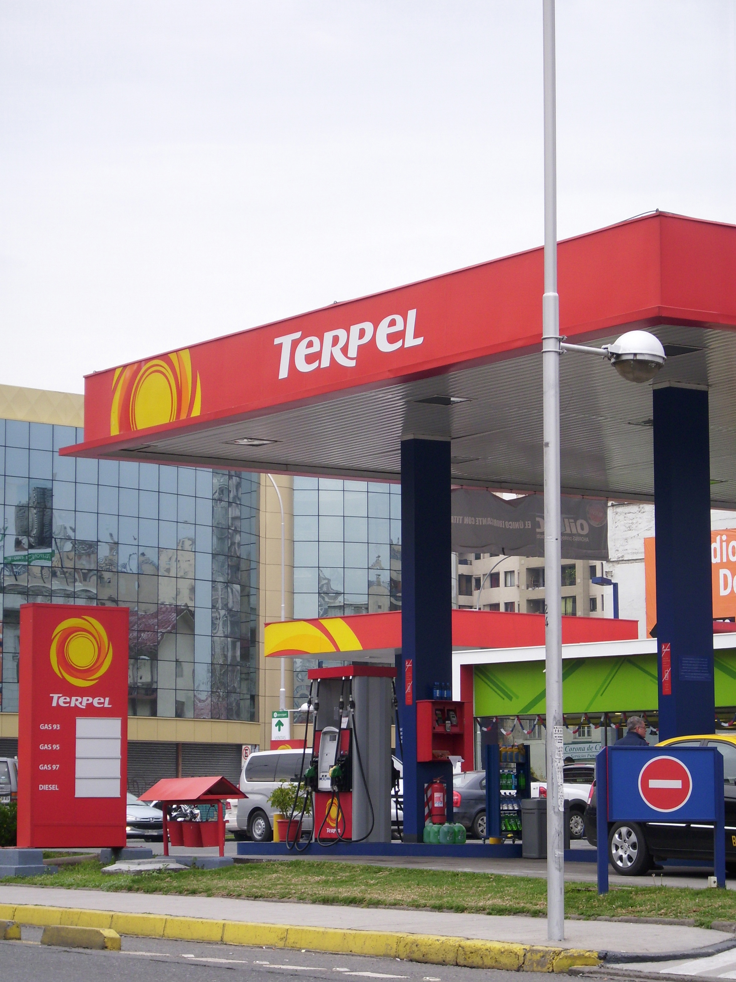 Una estación de servicio de la empresa Terpel, ubicada en la intersección de las calles Portugal y Curicó, en Santiago de Chile.